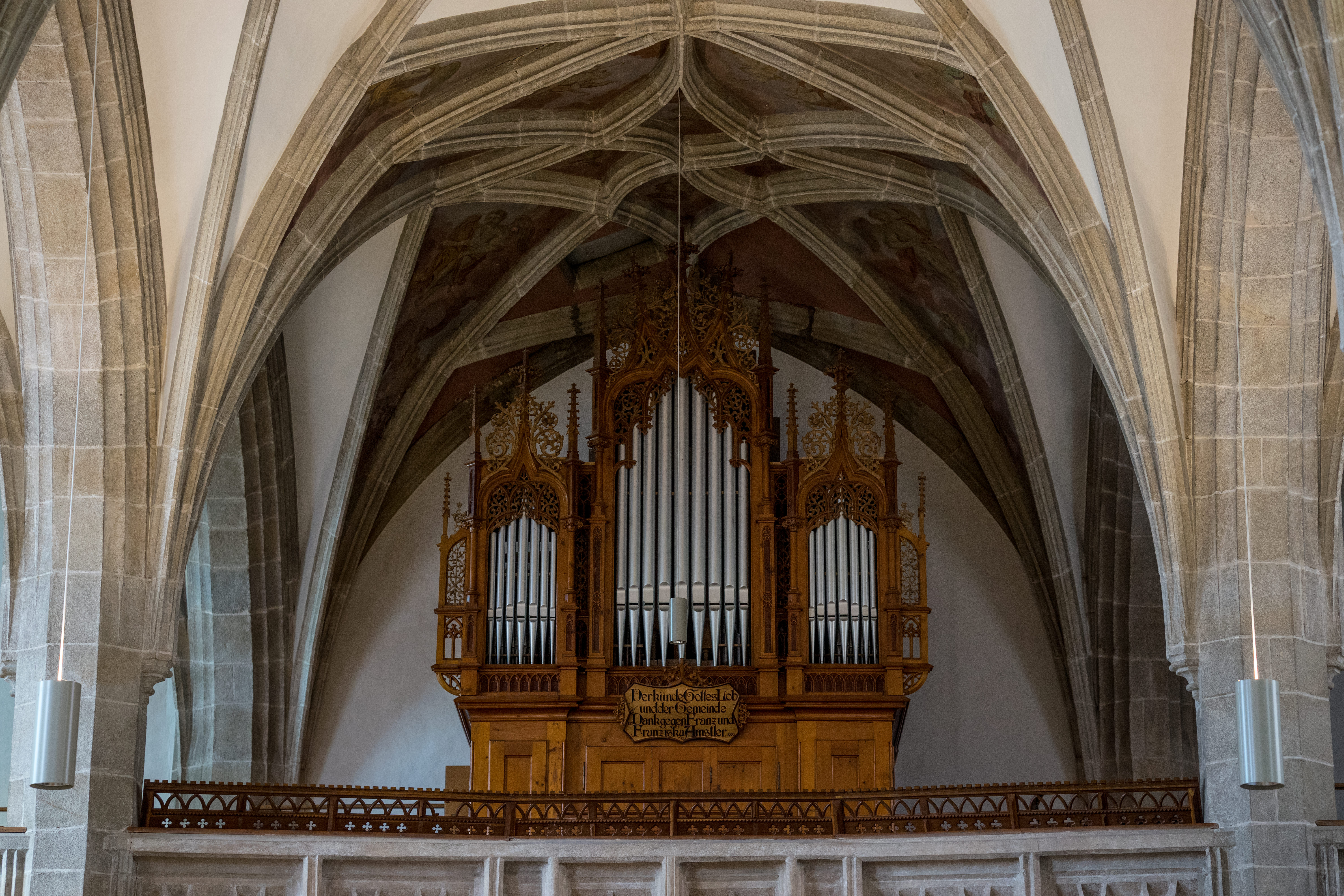 Wartberg ob der Aist Kirche Orgel